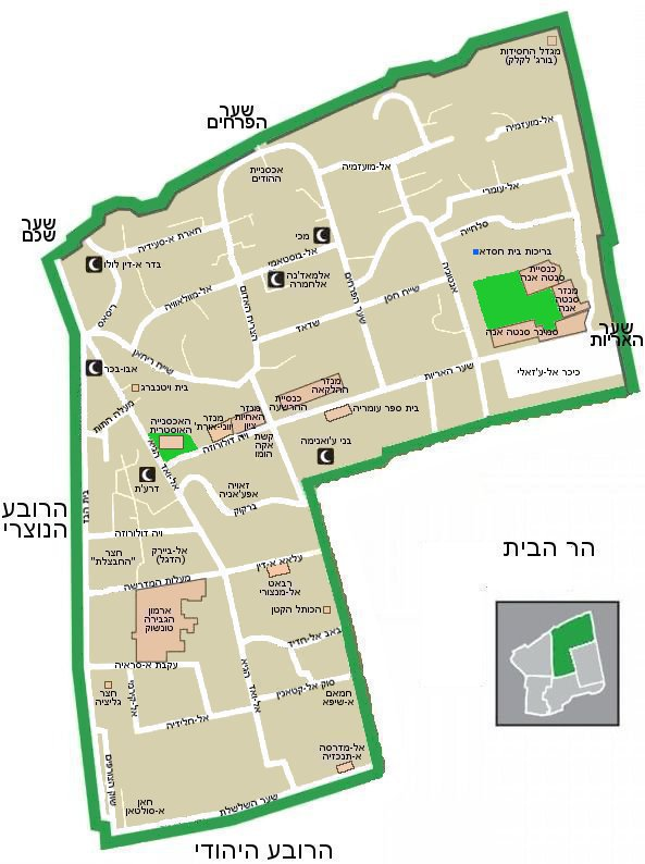 Muslin 1/4 in JRS